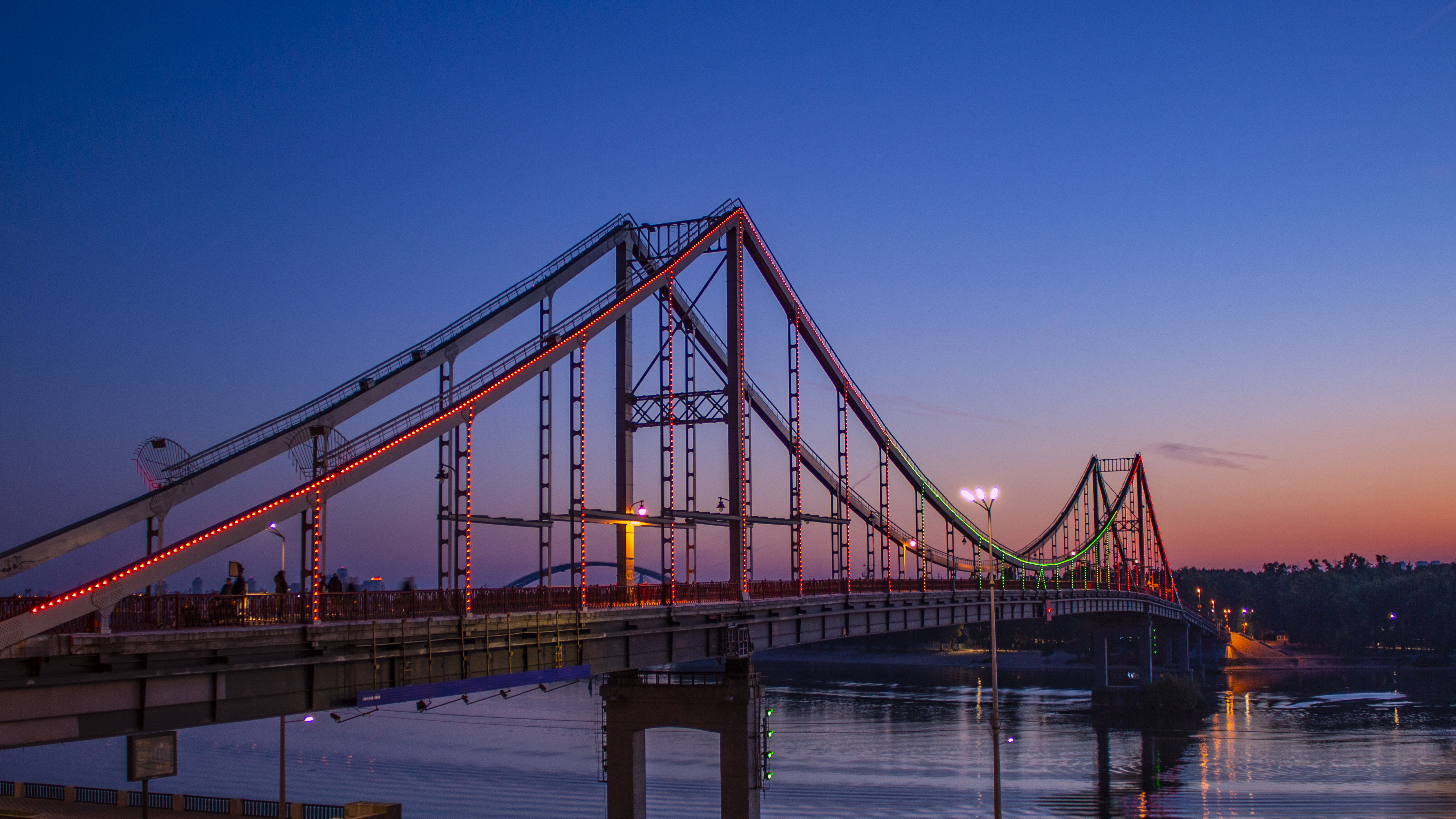 Парковий пішохідний міст, Київ, Набережна Дніпра, Труханів острів (Дніпровський, Печерський, Подільський райони)